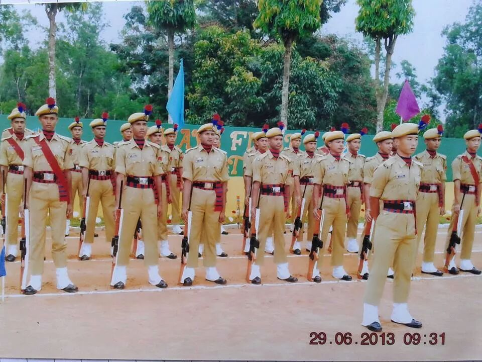 Tripura police